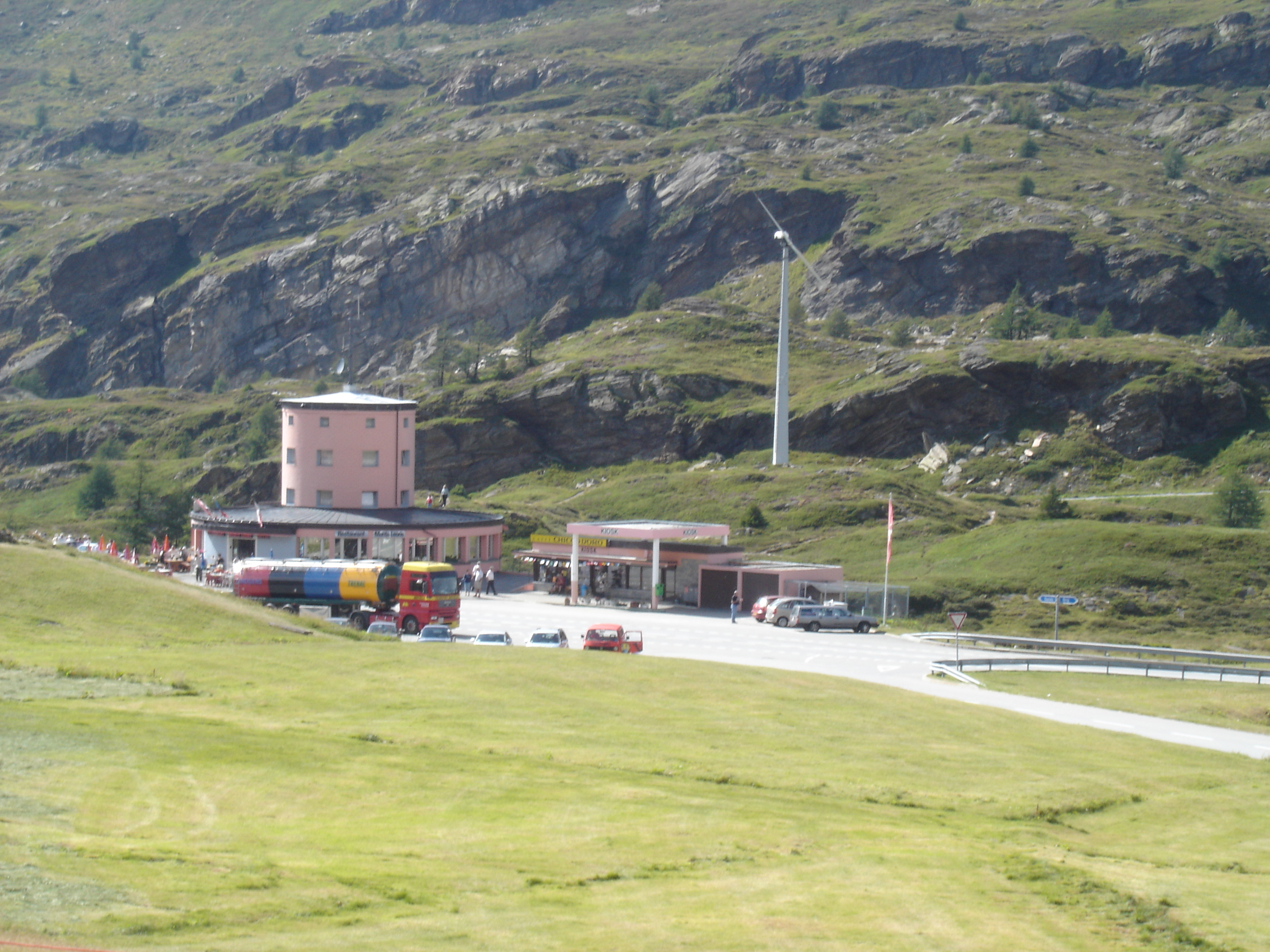 Restaurant Monte Leone auf dem Simplonpass